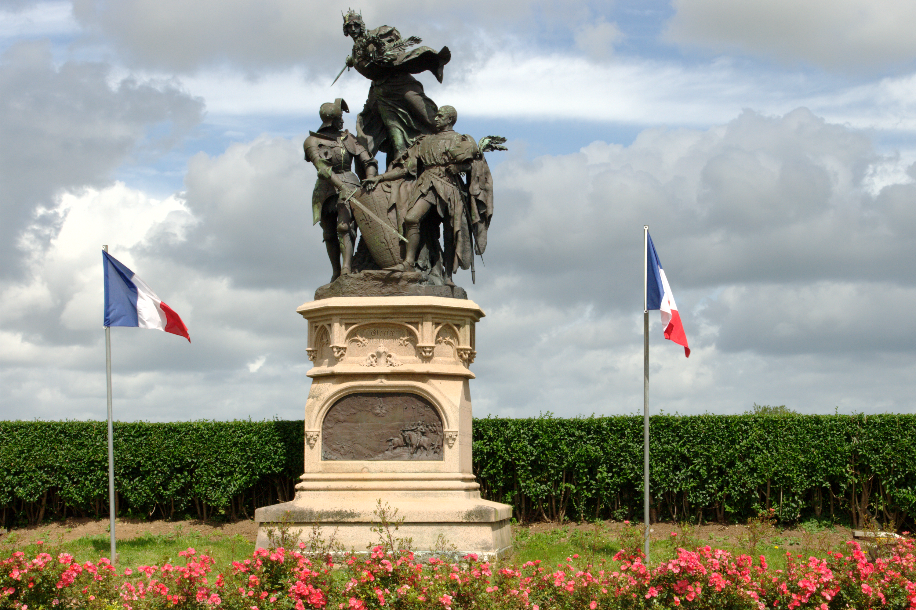 Monument commémoratif de la bataille de Formigny du 15 Avril 1450. Monument élevé par souscription en 1903.